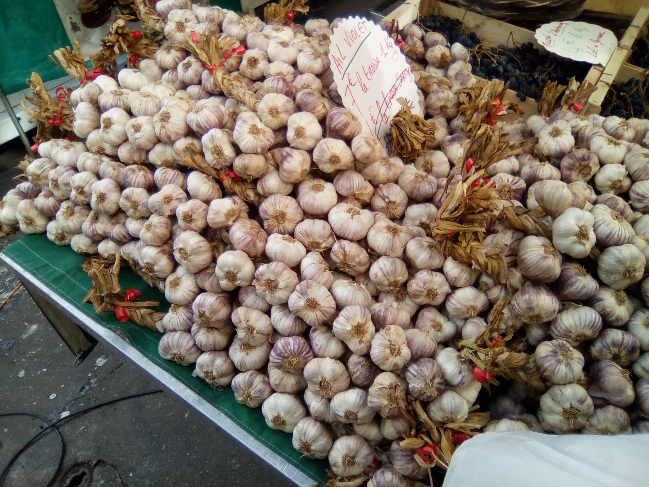 Stand du marché des Producteurs de Pays boulevard de Reuilly